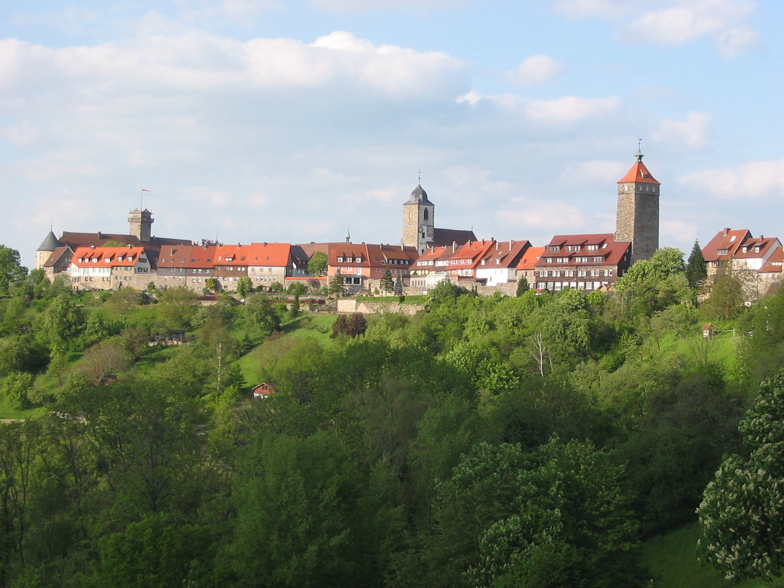 Der Ortskern von Waldenburg (Württemberg), Blick vom Höhenrandweg. Die Türme von links nach rechts: Schlossturm, Kirchturm, Bergfried (Staufferturm).